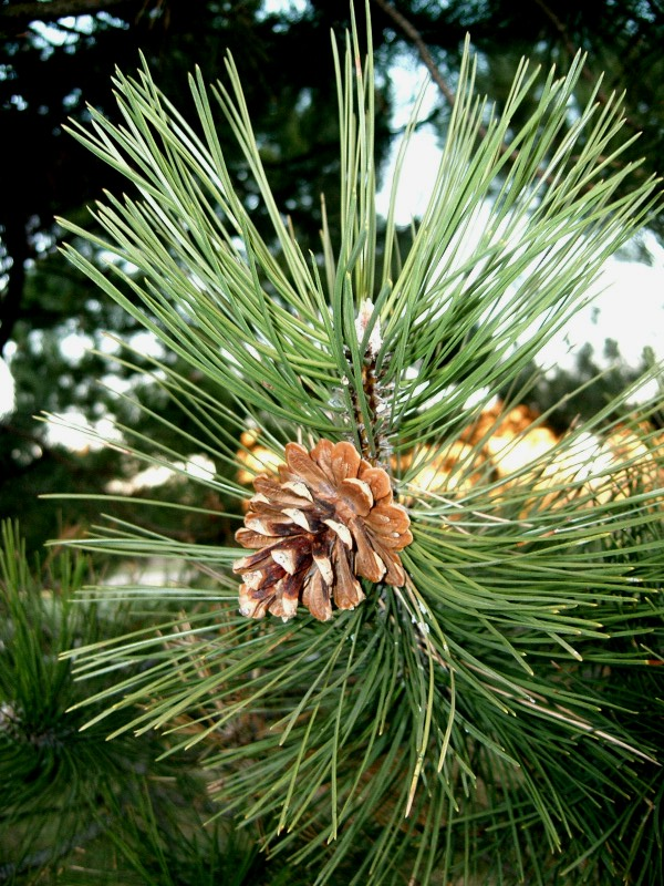 Pinus nigra Sosna czarna